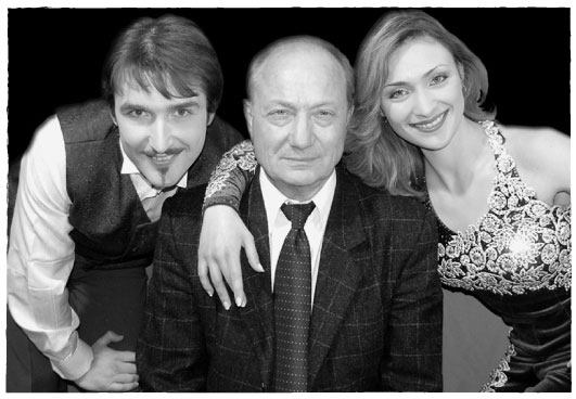 Cirko artistas, režisierius, direktorius, sportininkas – akrobatikos sporto meistras. Magijos teatro DiArchy prodiuseris.